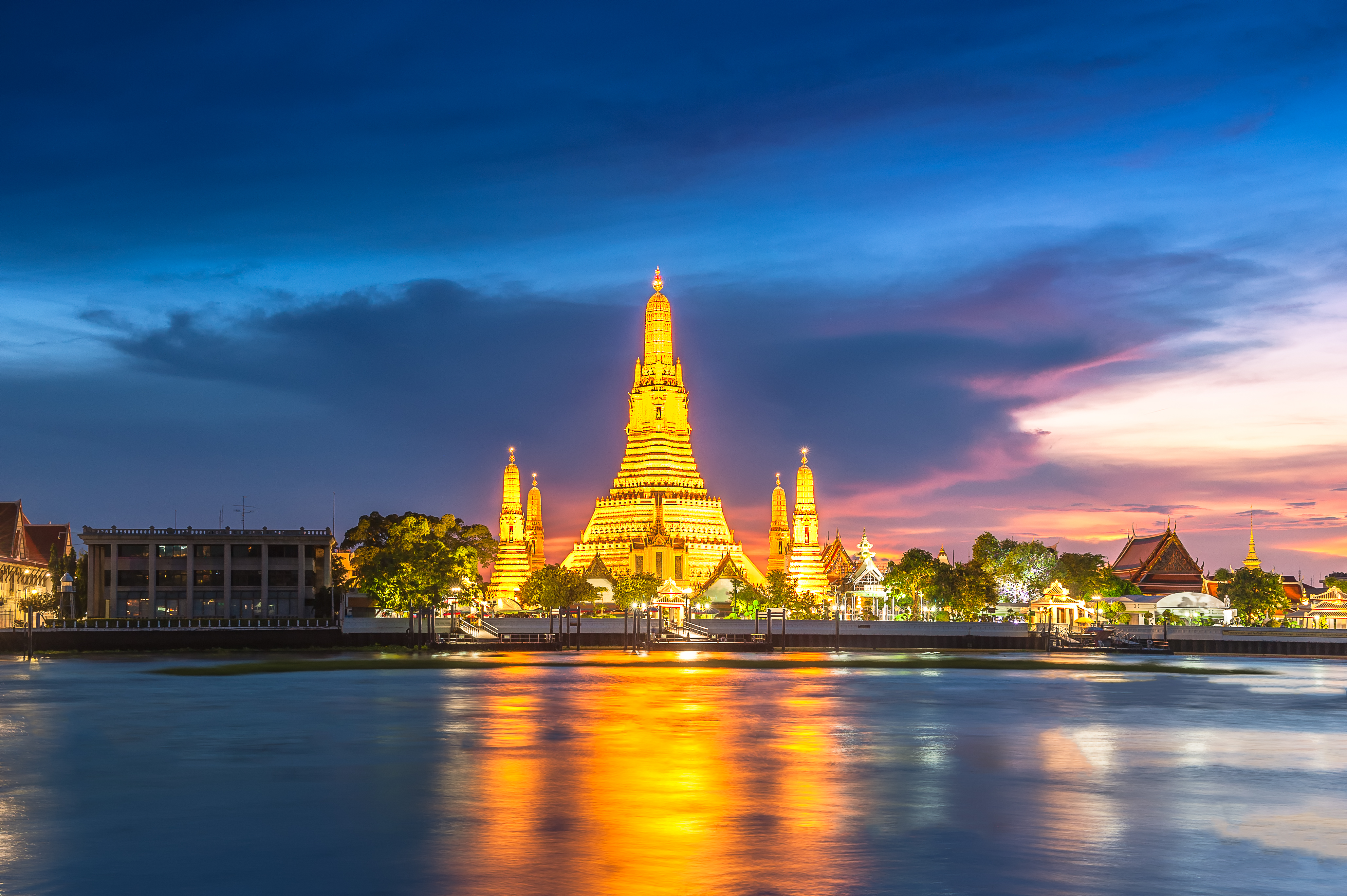 วัดอรุณราชวราราม